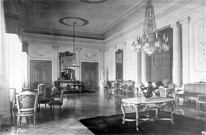 Repronegatief. Zaal in paleis van de Gouverneur-Generaal, Batavia